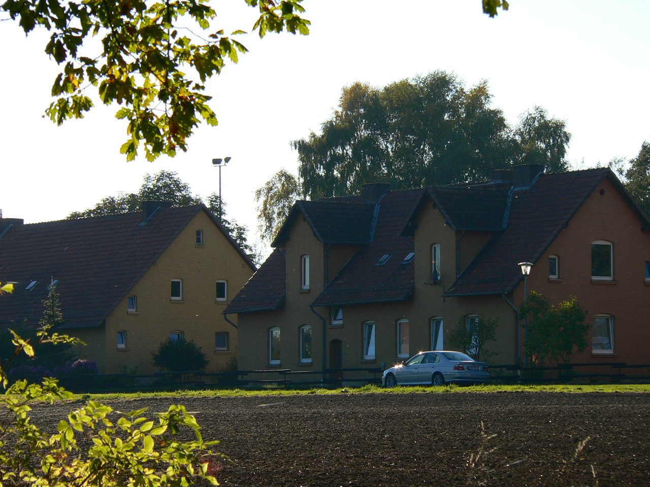 Domäne Beberbeck, Arbeiterhäuser